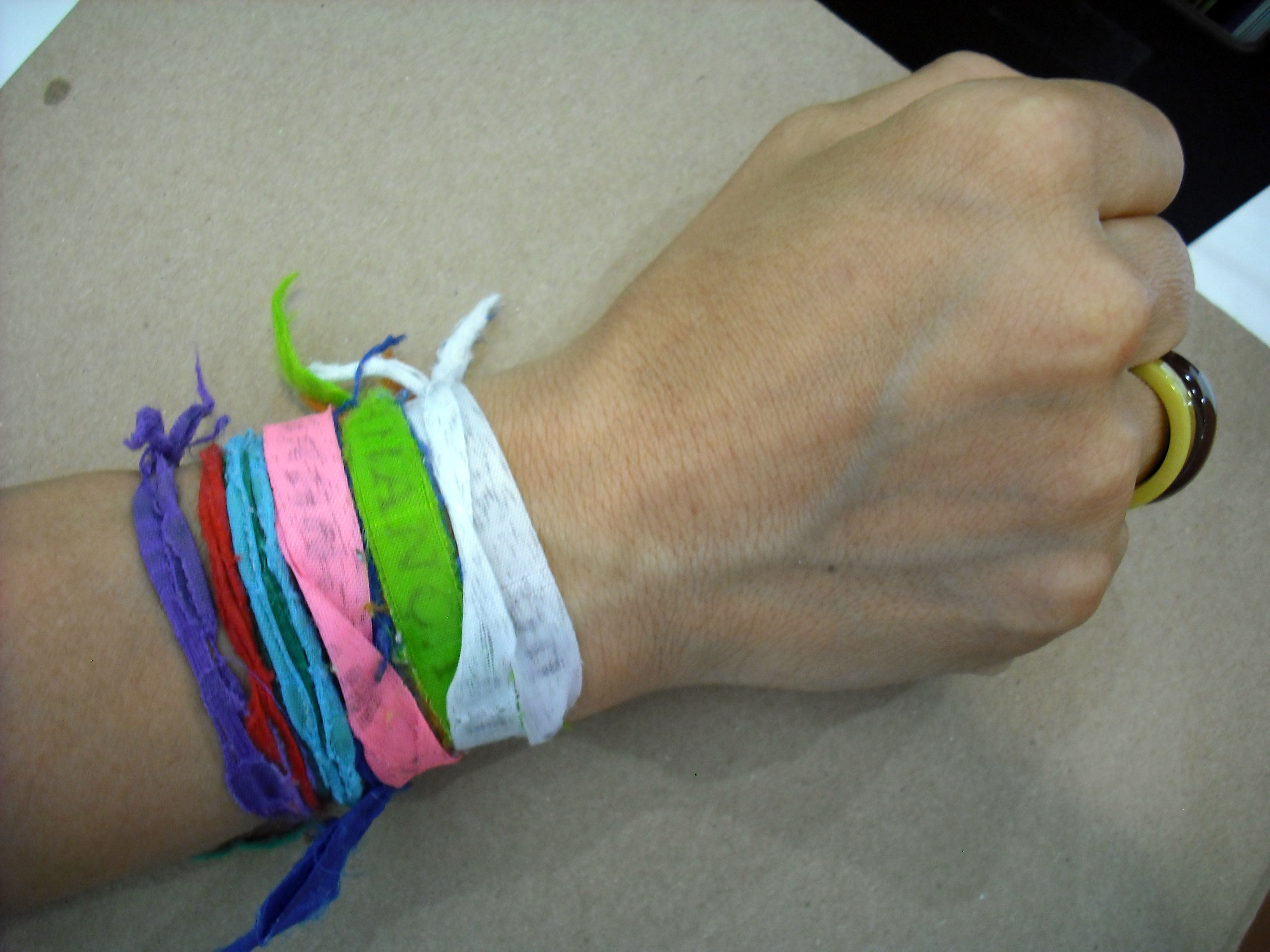 Fitas de Bonfim en el brazo de Erika.